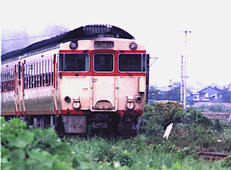 キハ91系の最後の営業運転は国鉄名古屋鉄道管理局で高山線急行のりくら号として毎日名古屋ー高山を一往復した。 高山本線 長森ー那加